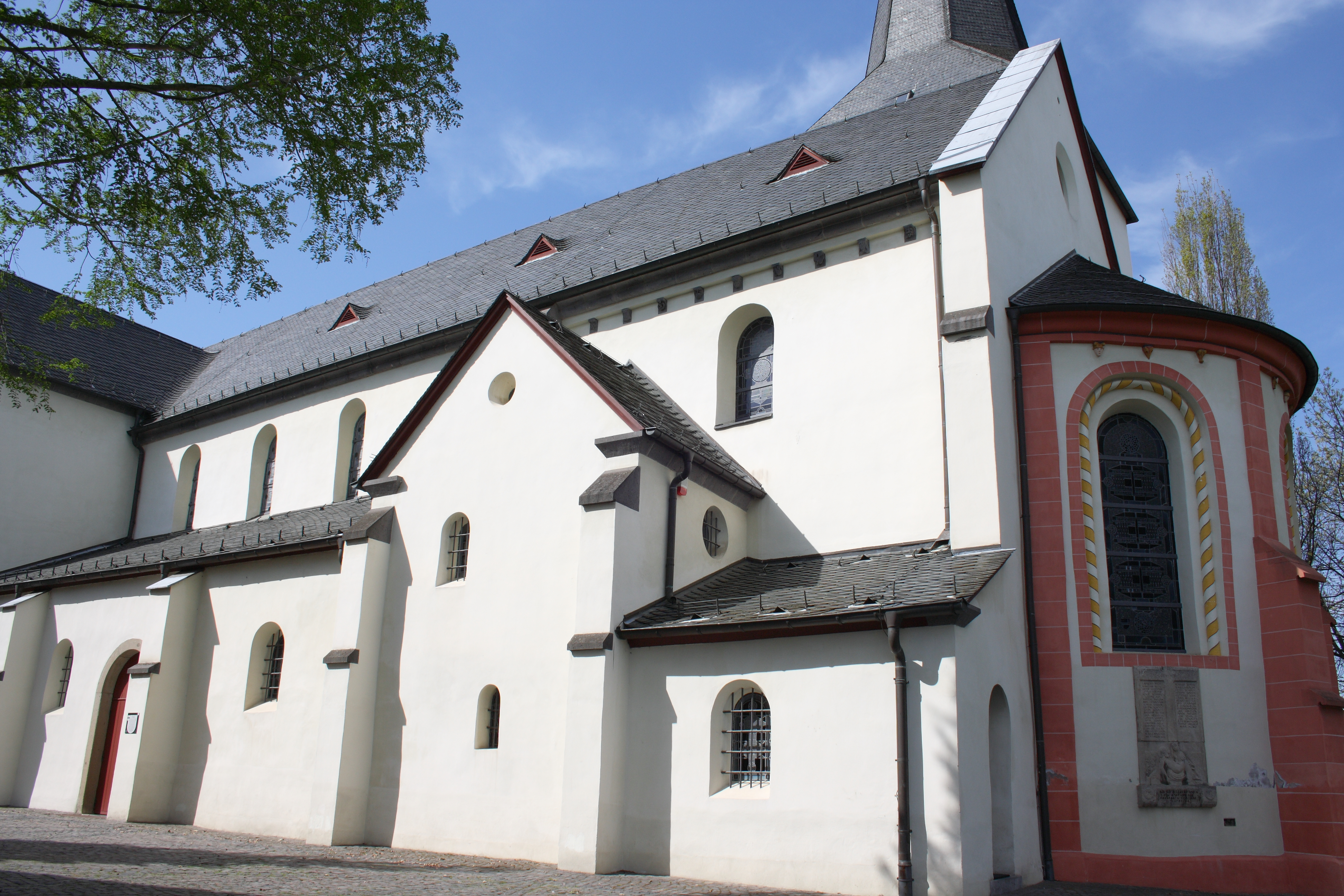 katholische Pfarrkirche St. Walburga in Walberberg, Stadtteil von Bornheim